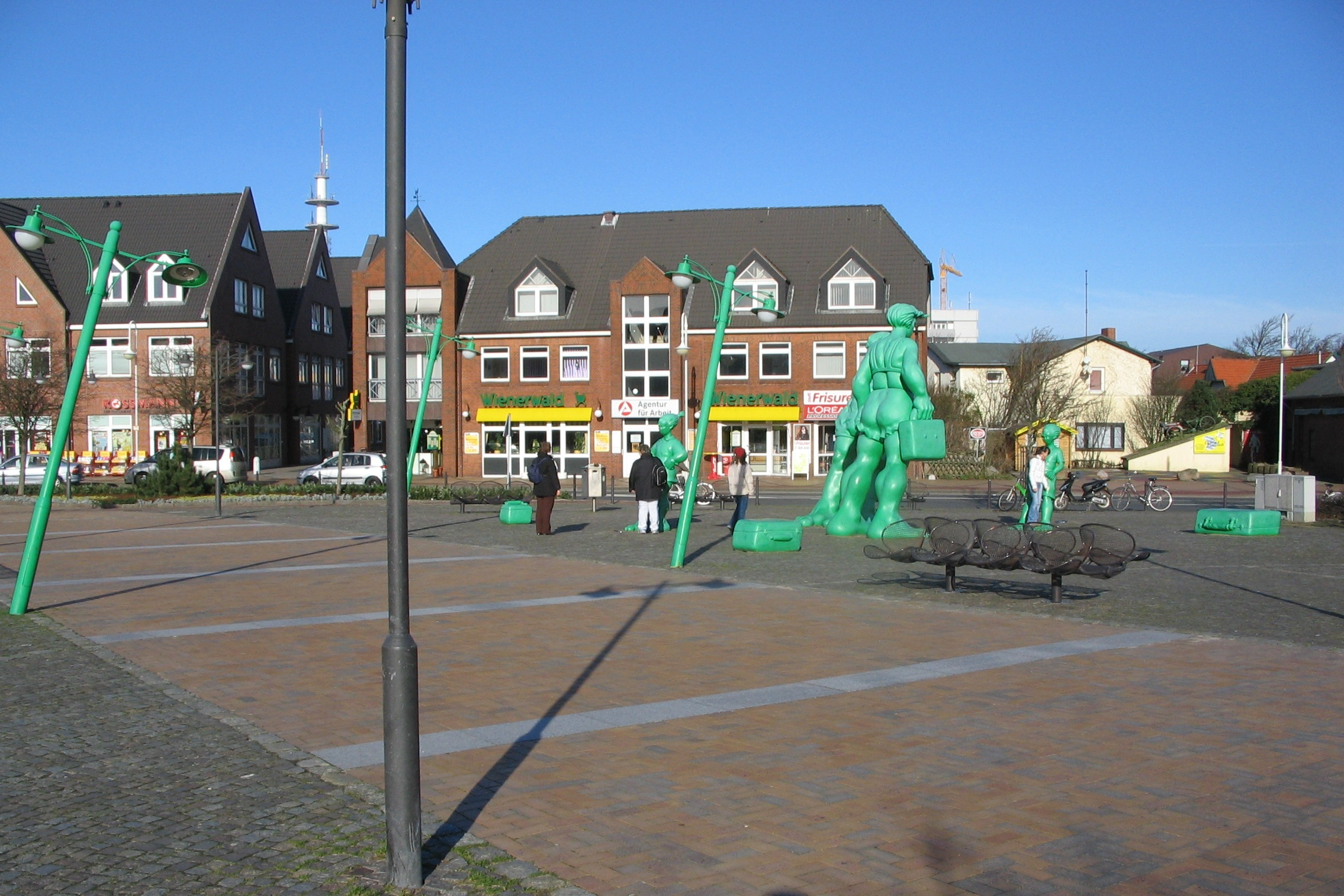 Skulpturen "Reisende im Wind", geschaffen von Martin Wolke 2001 auf dem Bahnhofsvorplatz in Westerland auf Sylt